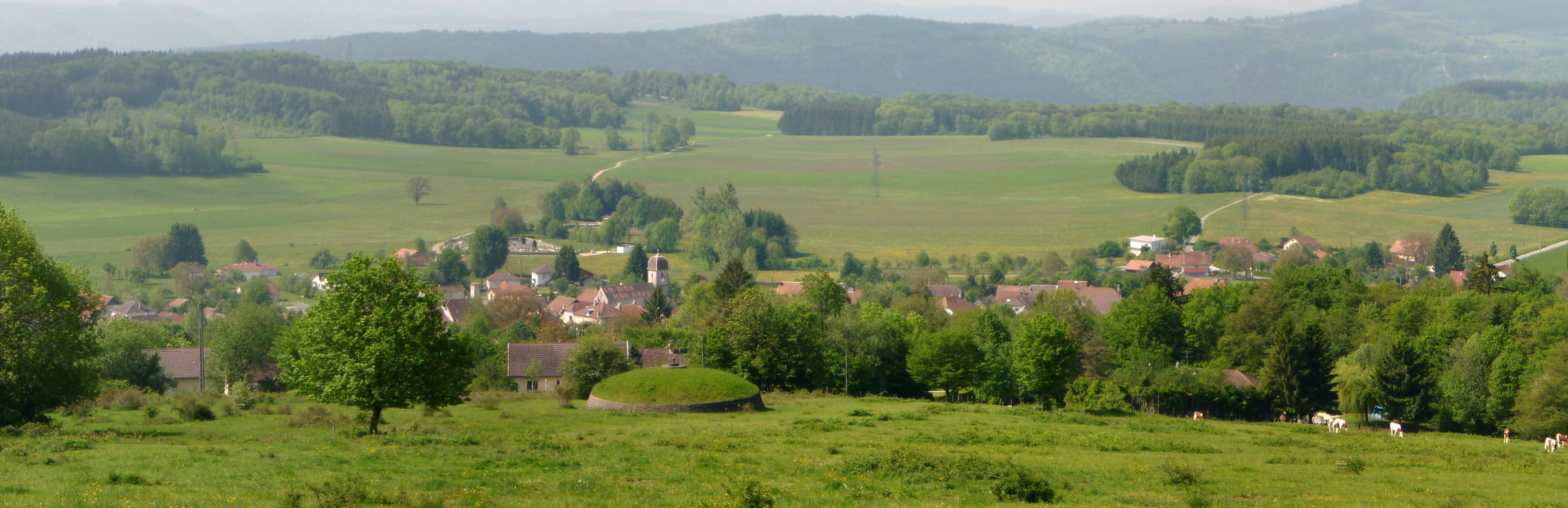 Vue panoramique entrecoupée d'arbres composé&e de plusieurs photos assemblées et retouchées par Windows live photo galery.